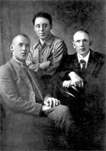 Бядуля, Дубоўка і Каспяровіч